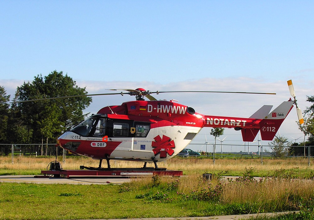 Niebüll Luftrettung DRF Rettungshubschrauber Eurocopter BK 117 Christoph Europa 5 D-HWWW . Foto 2007 by Wolfgang Pehlemann Wiesbaden. File was DSCN6195